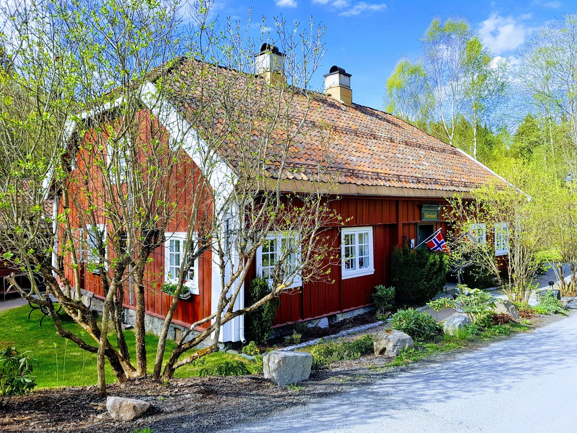 Vertshuset ble opprinnelig oppført av tømmer i cirka 1640. Det ligger rett ved elva Lomma ved Bærums Verk i Bærum (Akershus) og er fredet. Stedet er i dag restaurant.